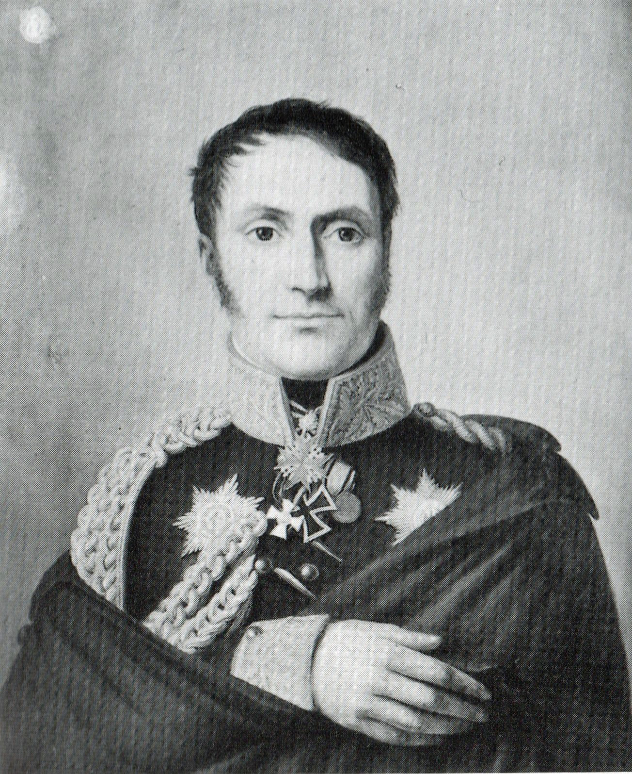 Ölgemälde von Ludwig von Borstell, früher im Schloß Königsberg.